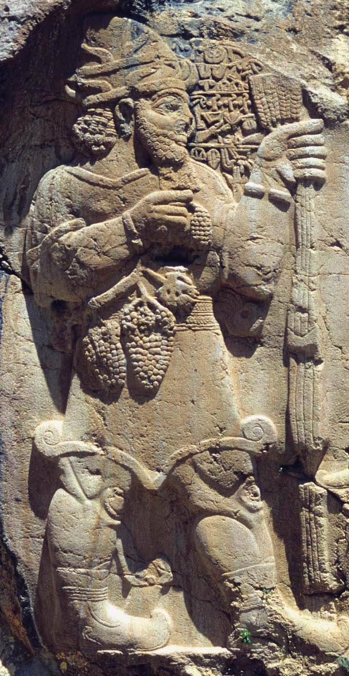 Gott Tarhunzas mit Weinrebe vom Felsrelief von Ivriz